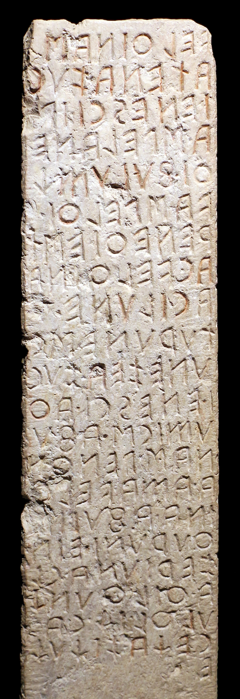 Museo Archeologico Nazionale dell'Umbria